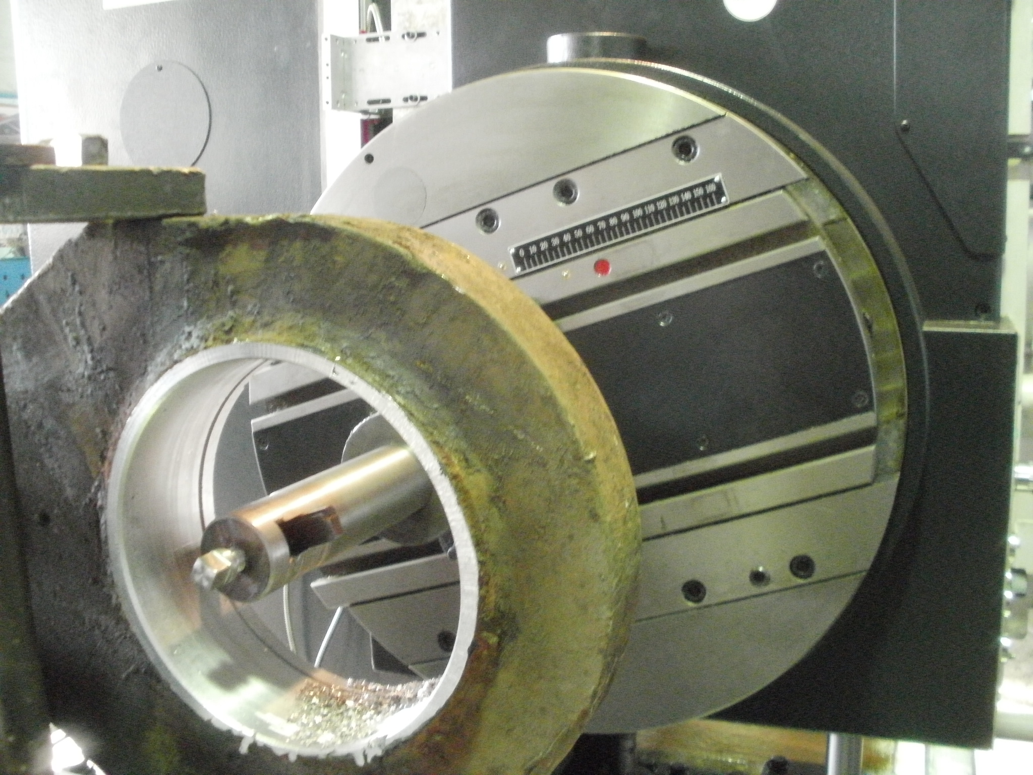 Растачивание